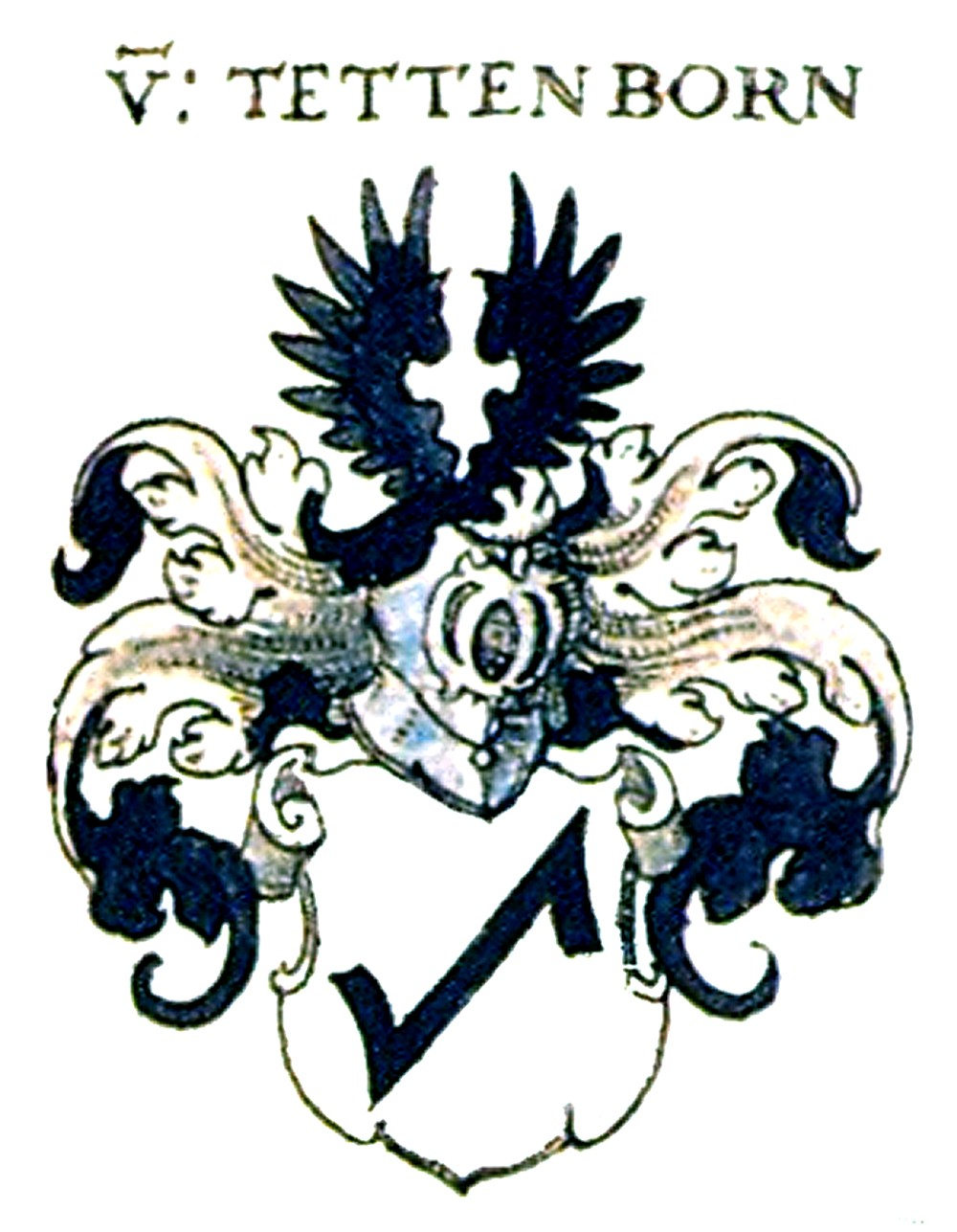 Wappen der Thüringischen Adelsfamilie Tettenborn